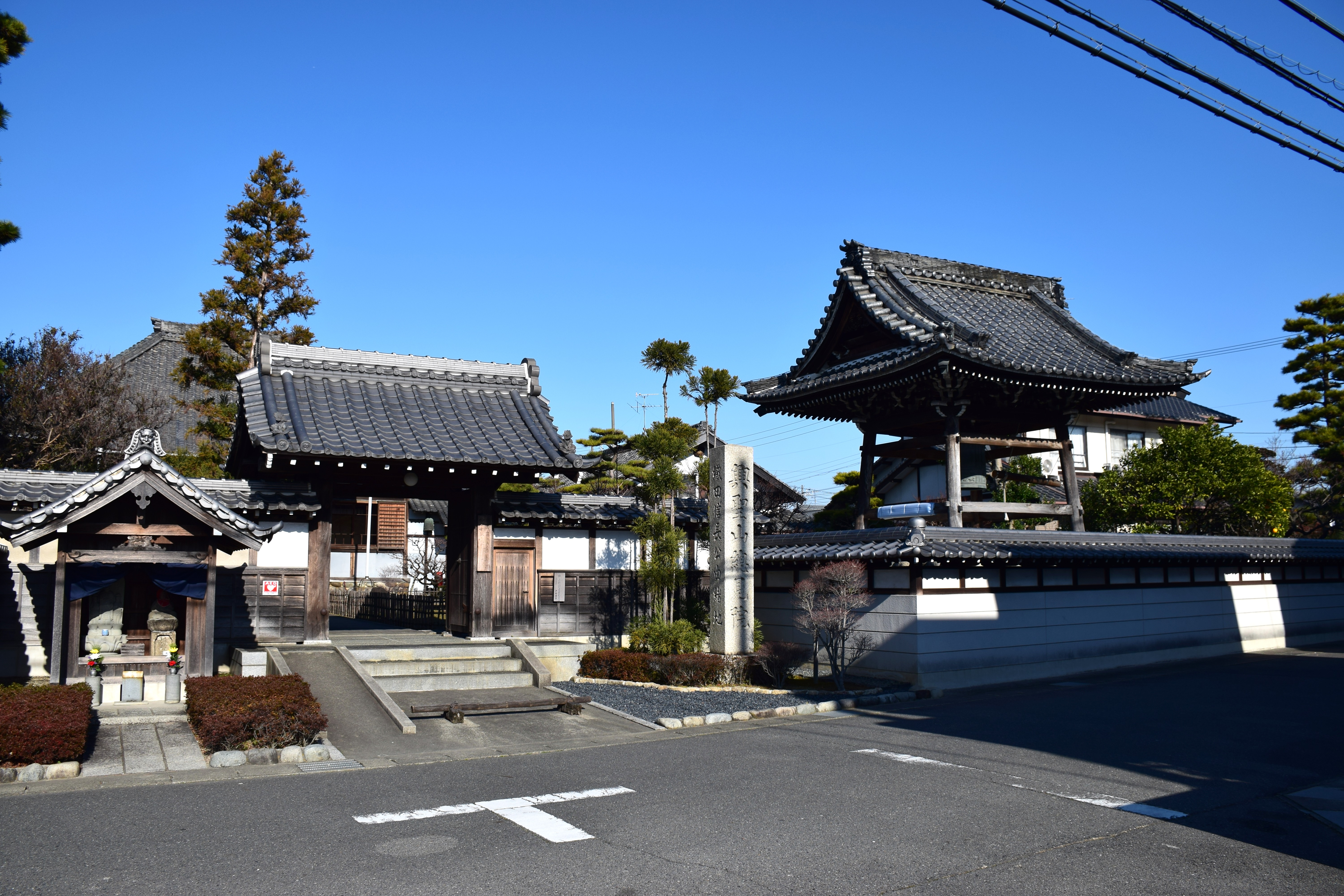 愛知県清須市にある総見院。山門と鐘楼。